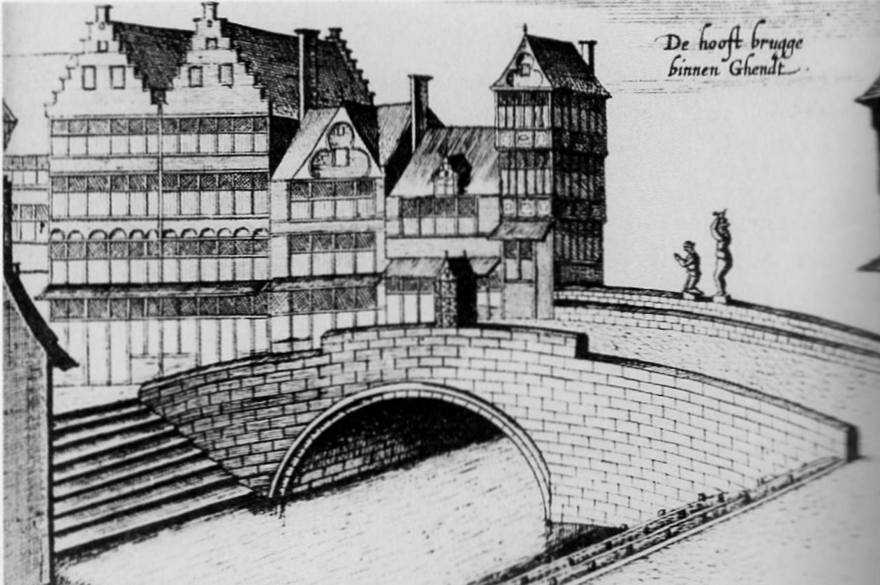 Enthauptungsbrücke in Gent, Kupferstich